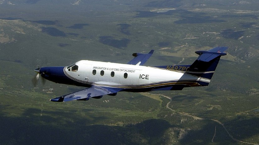 Es un plane de Halo of U.S. Immigration and Customs Enforcement.